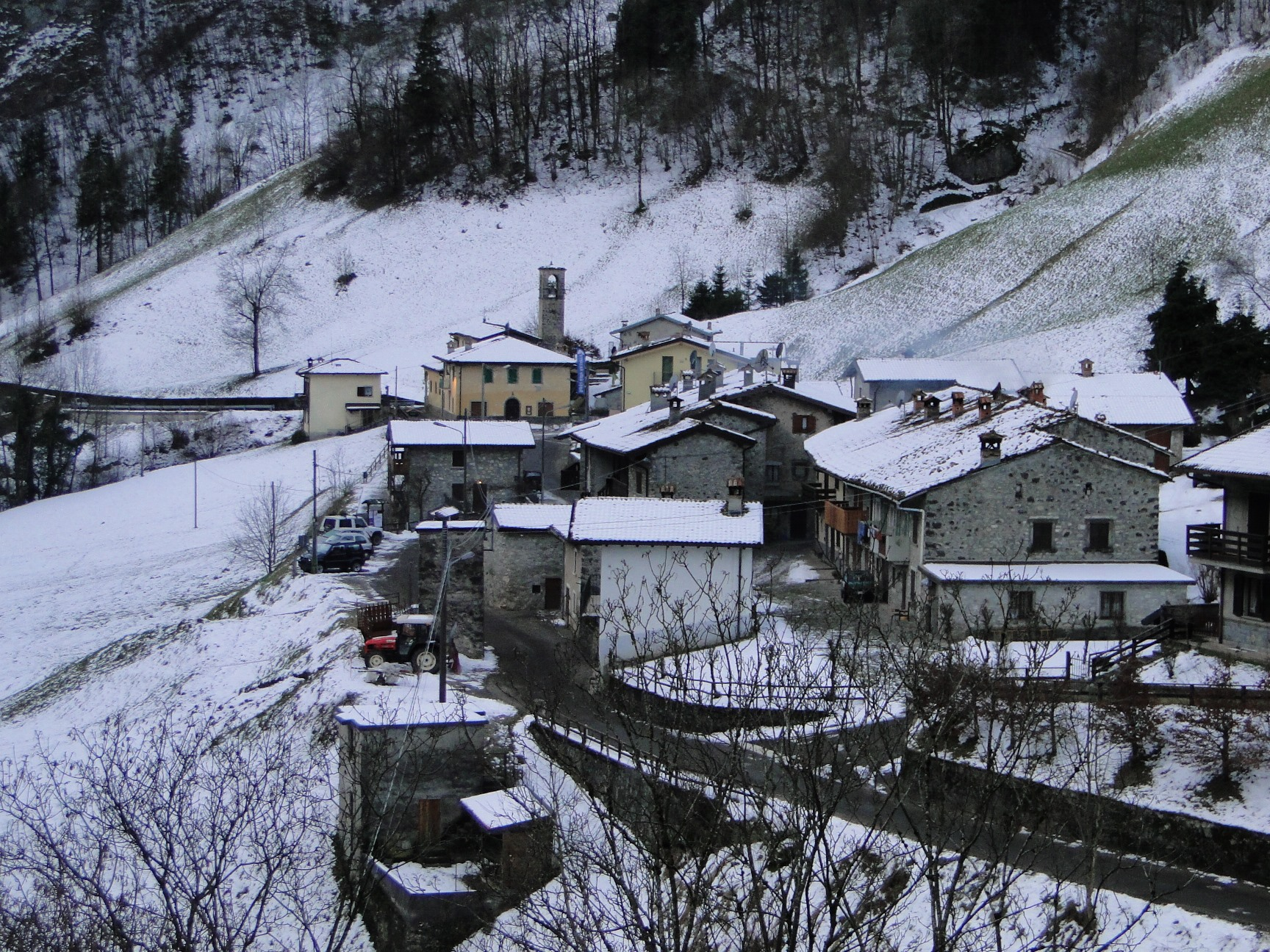 Panorama di Valzurio, fraz. di Oltressenda Alta (BG). Italy